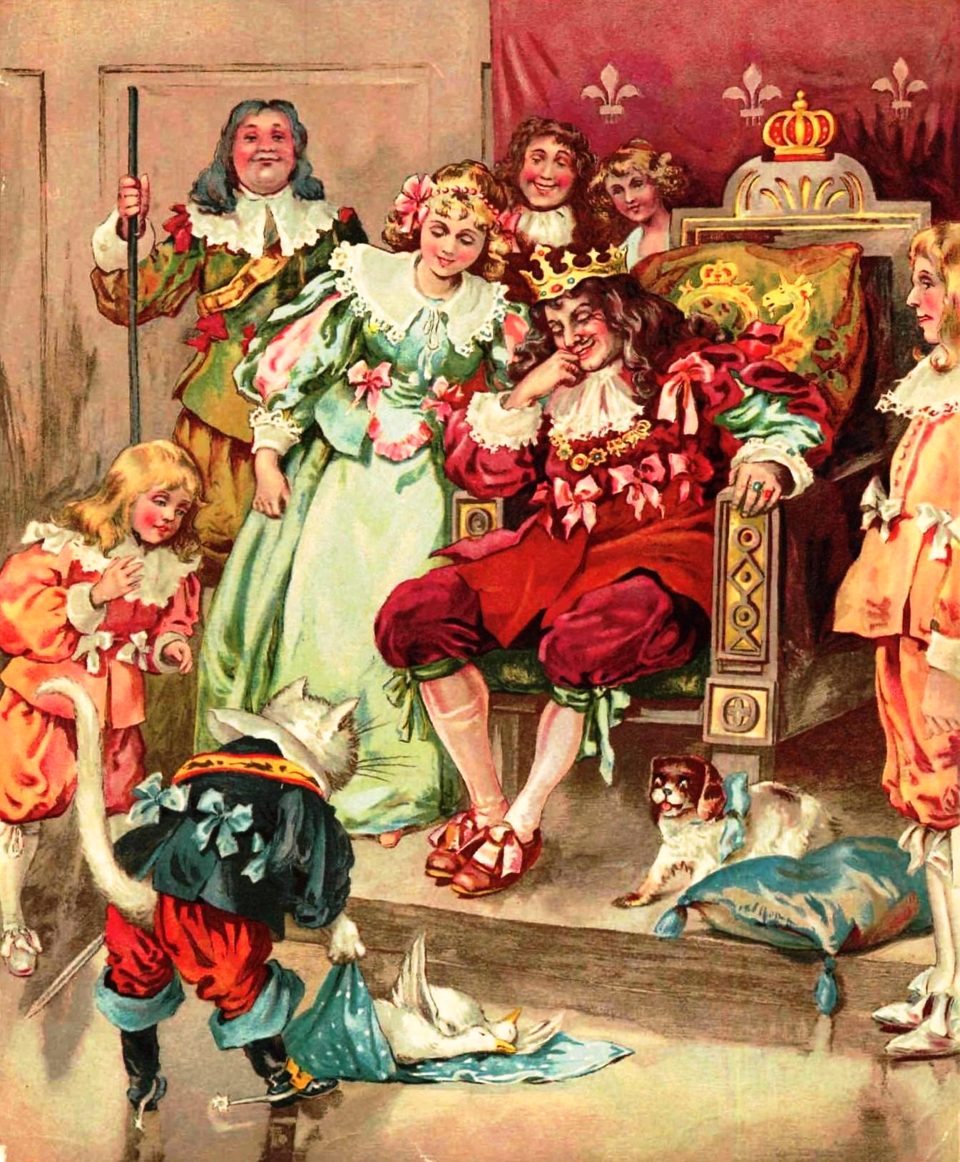 ilustracje do książki "Kot w butach" publikacja Księgarni Konstantego Trepte Warszawa 1900